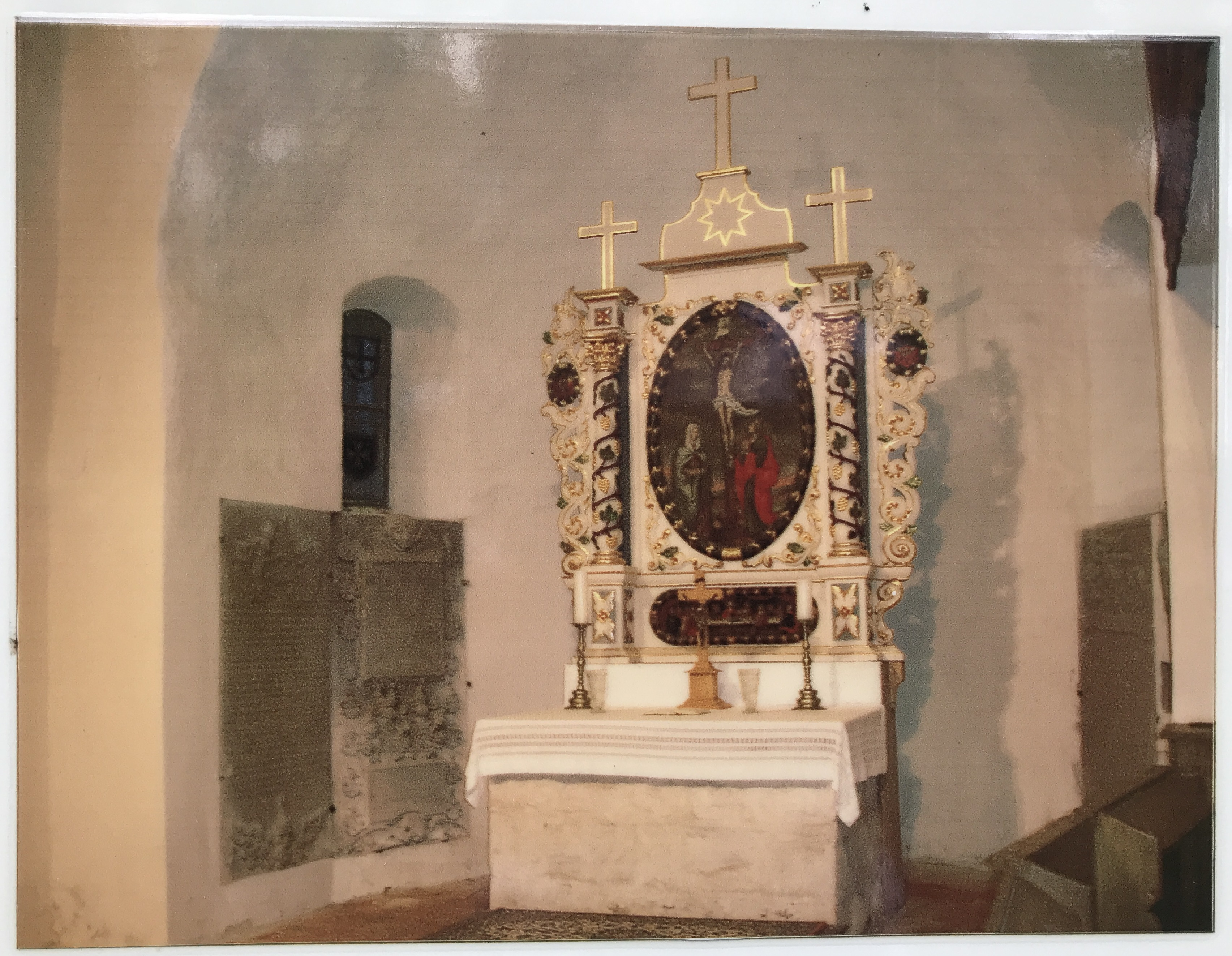 Die Dorfkirche Tempelberg ist eine Feldsteinkirche aus dem 13. Jahrhundert in Tempelberg, einem Ortsteil der Gemeinde Steinhöfel im Landkreis Oder-Spree. Aufnahme auf einer öffentlich zugänglichen Informationstafel der Gemeinde östlich des Bauwerks (Siehe commons).